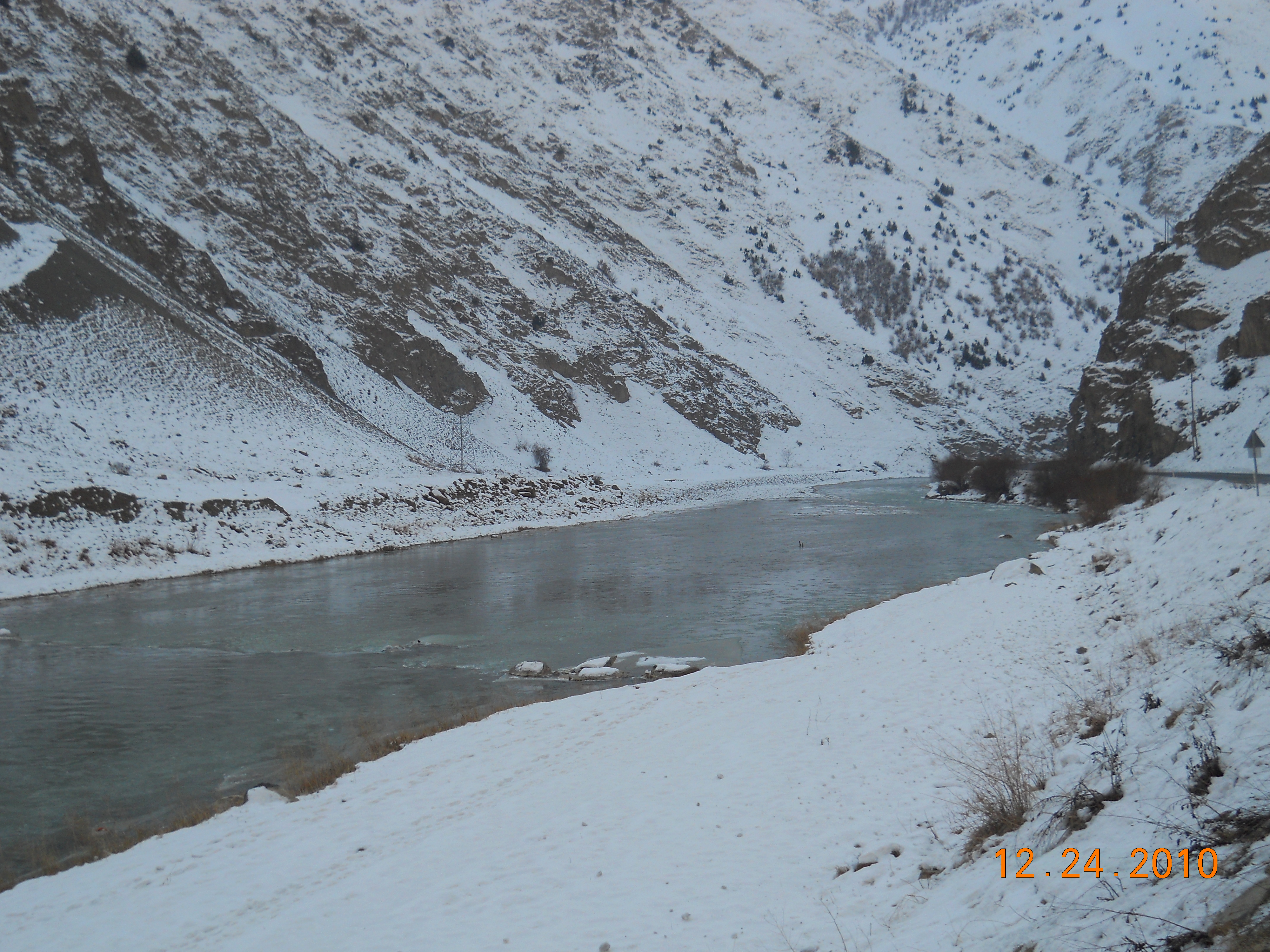 Kış aylarında Zap Nehri